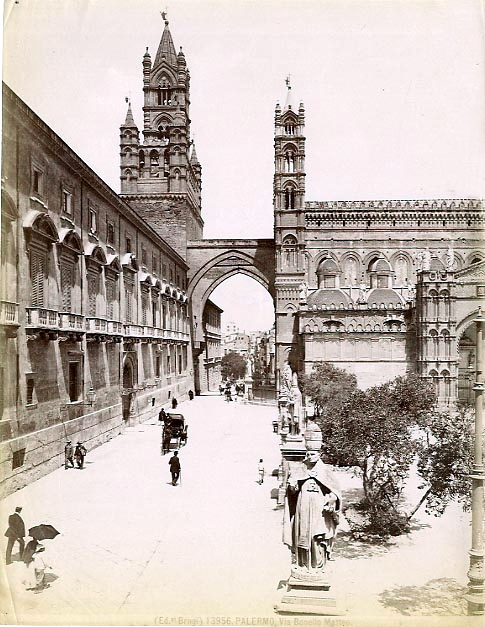 Carlo Brogi (1850-1925), "Palermo - Via Bonello Matteo". Numero di catalogo: 13956.